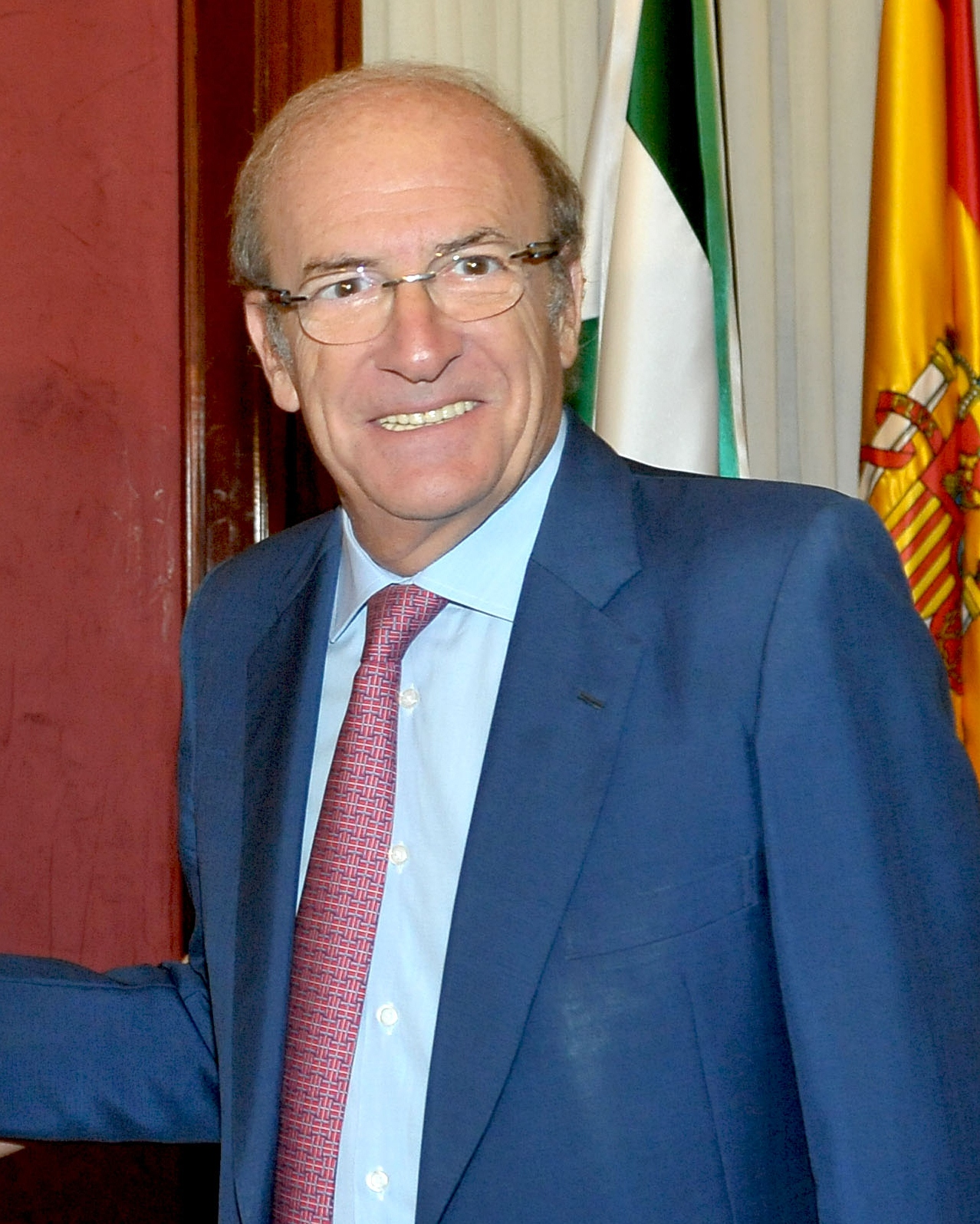 Pedro Rodríguez González